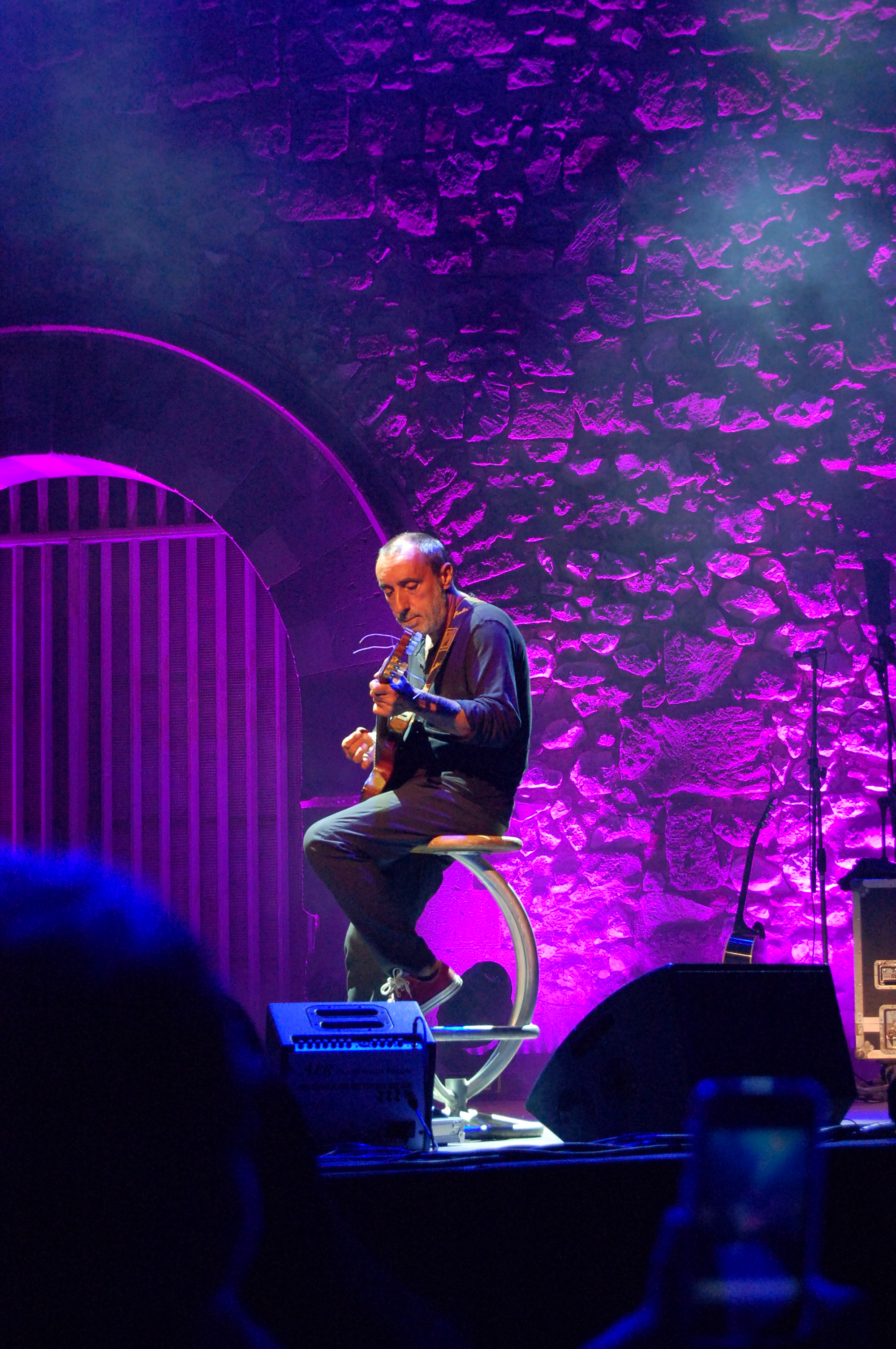 Fausto Mesolella live settembre al borgo 2013